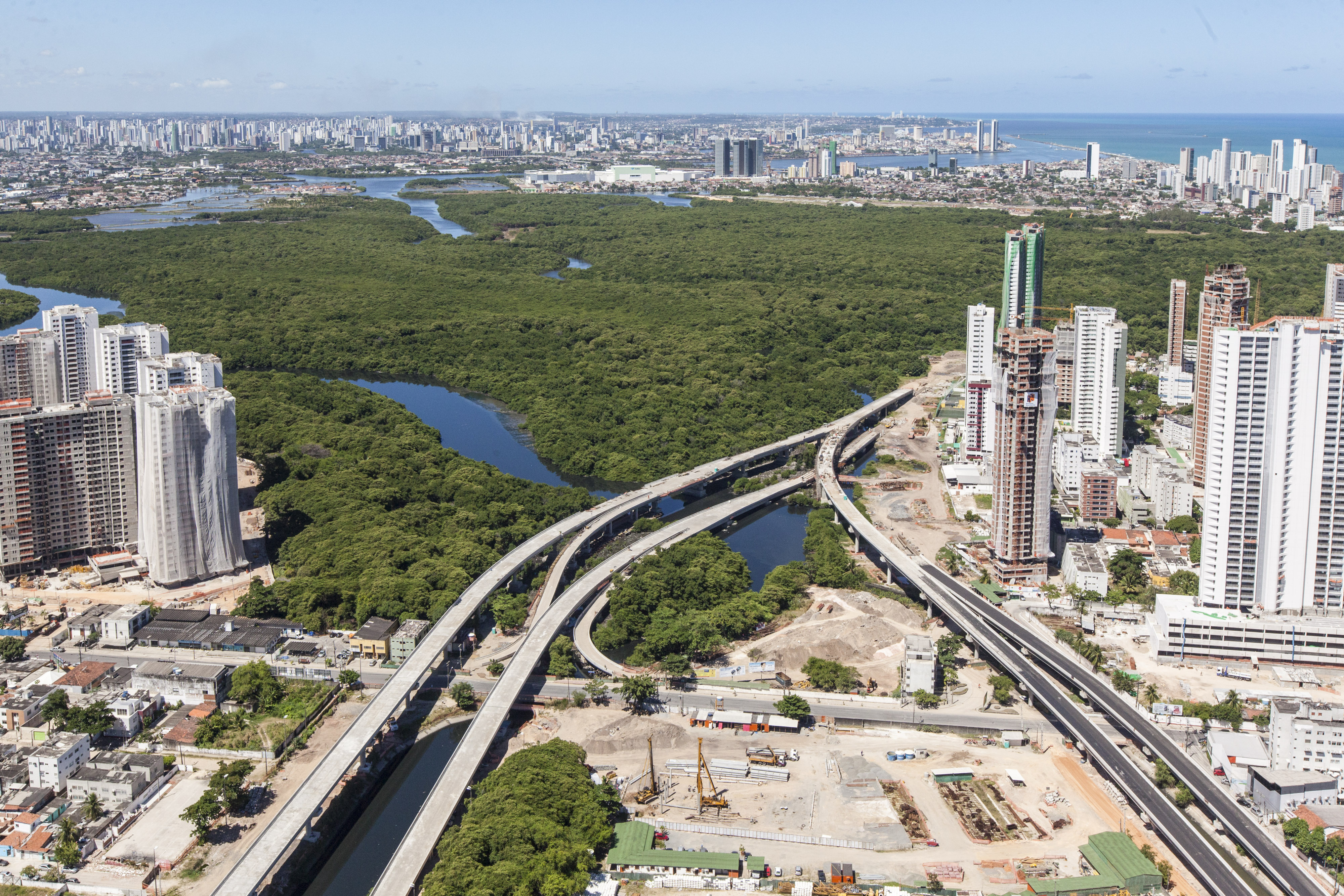 Via Mangue em construção - Recife, Pernambuco, Brasil